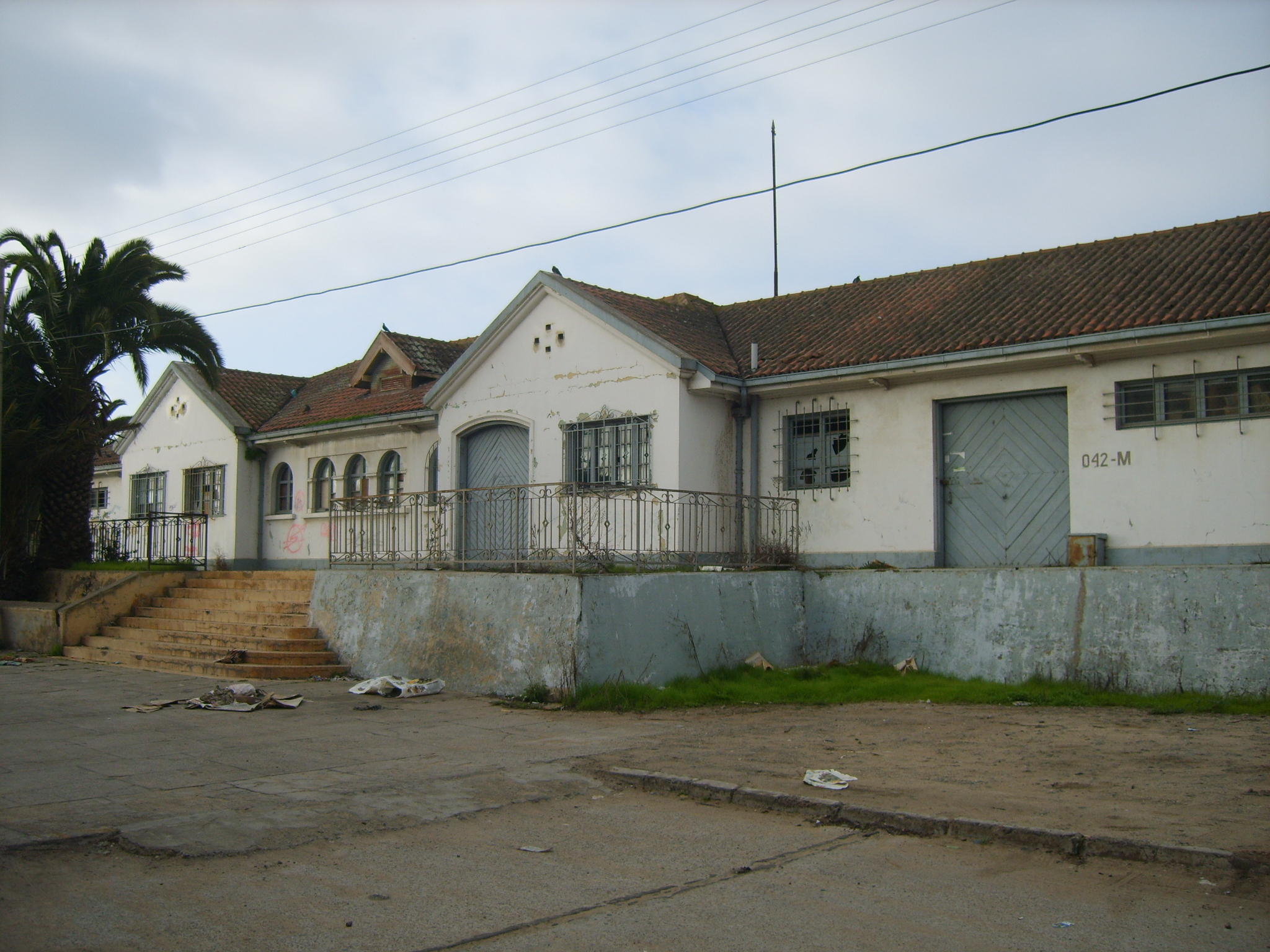 Ex-Estación de Ferrocarriles de Coquimbo